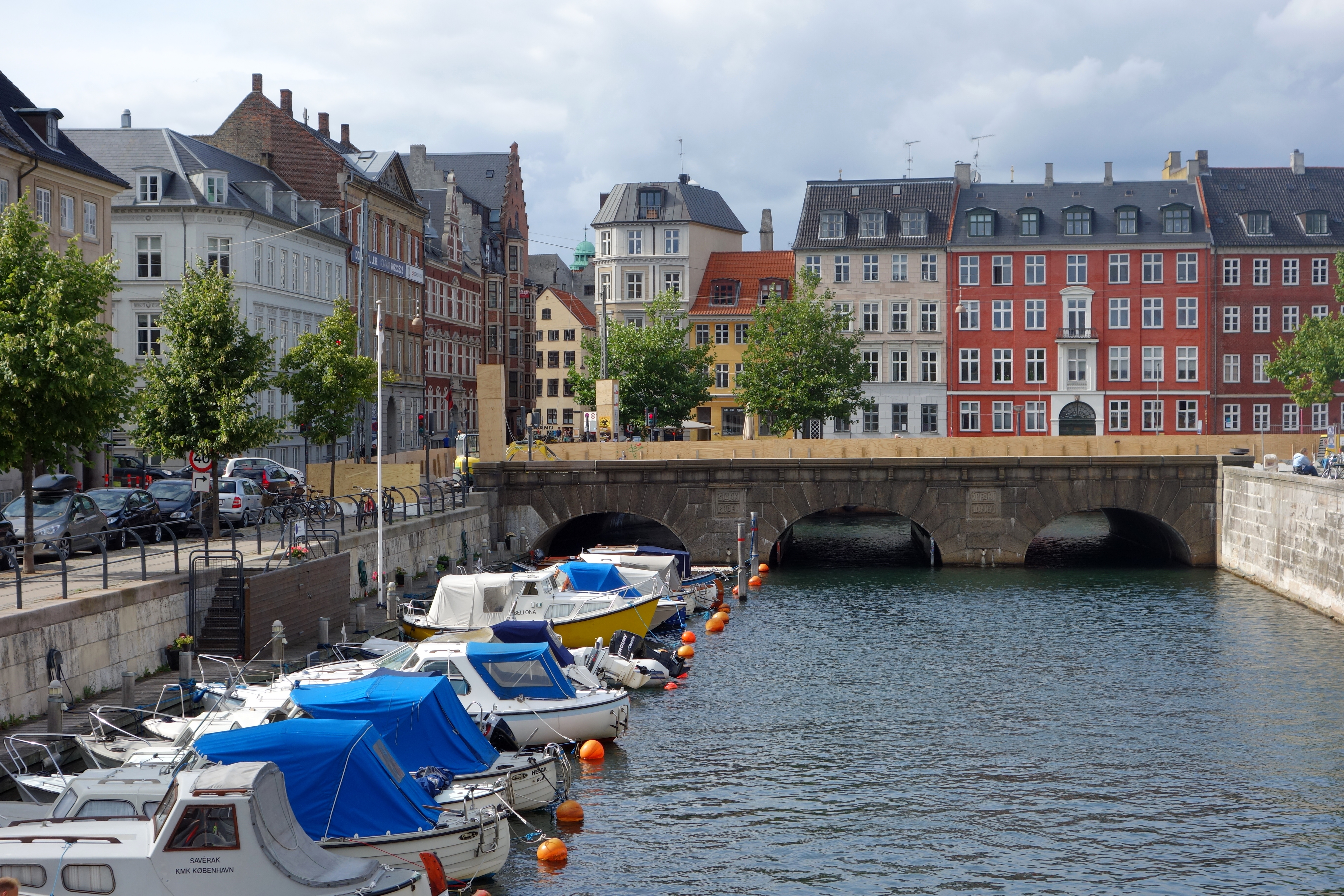 Stormbroen bridge in Copenhagen, Denmark